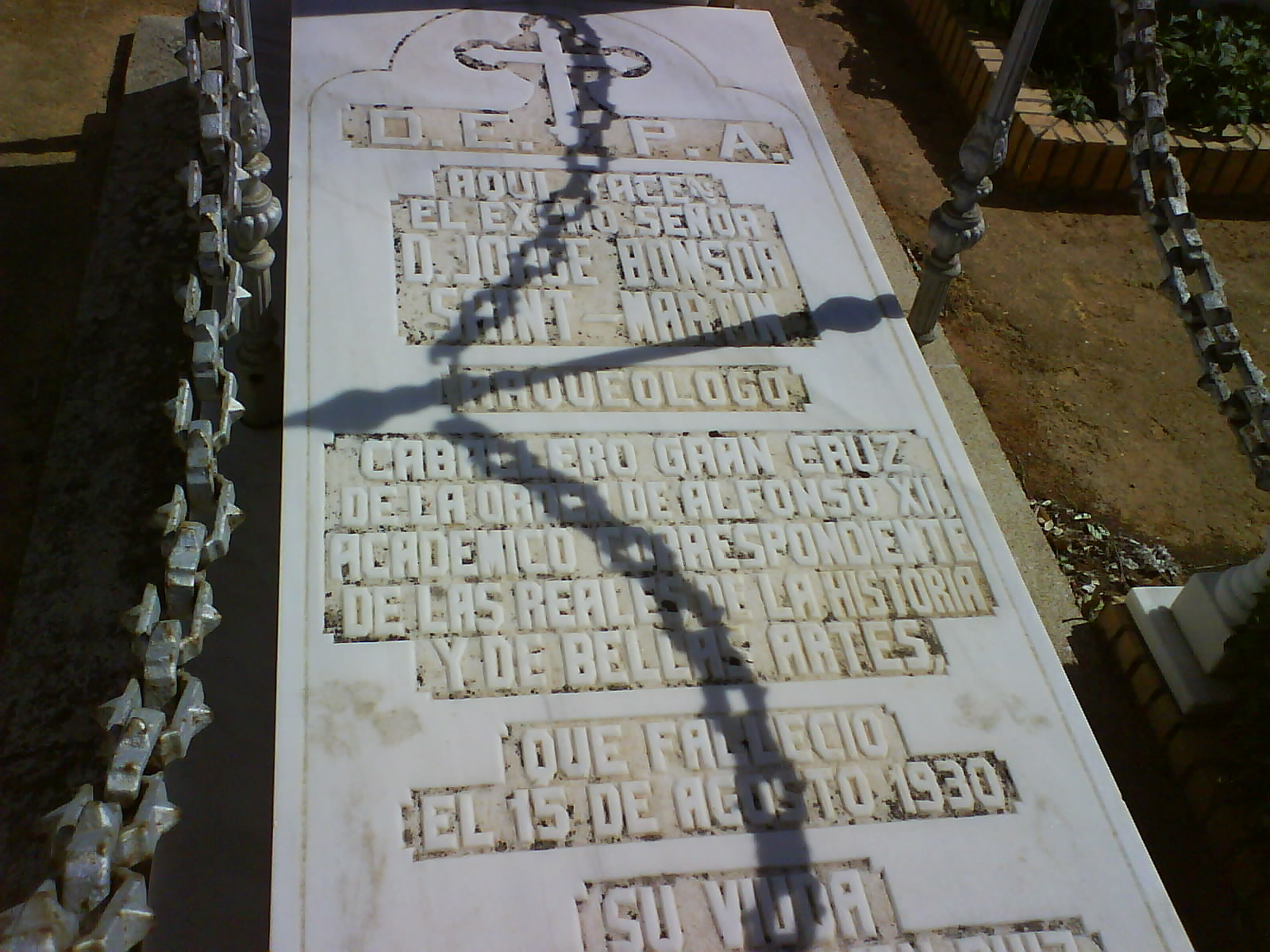 Lápida de Jorge Bonsor.